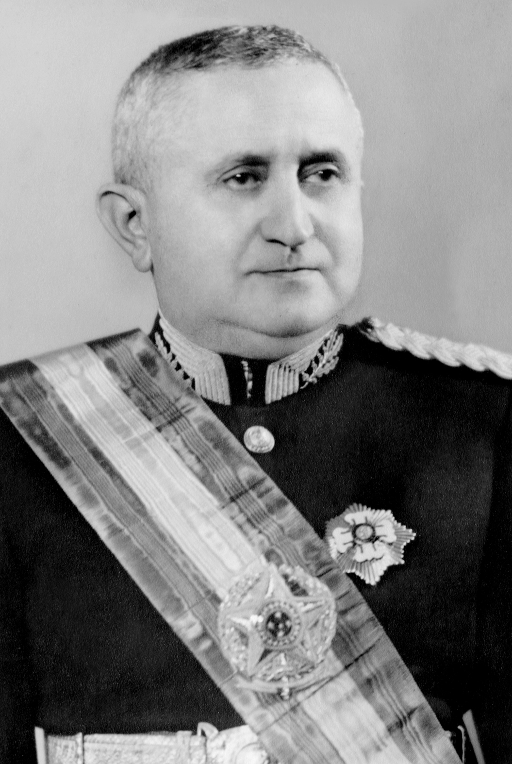 Foto oficial de Eurico Gaspar Dutra, presidente do Brasil entre 1946 e 1951.